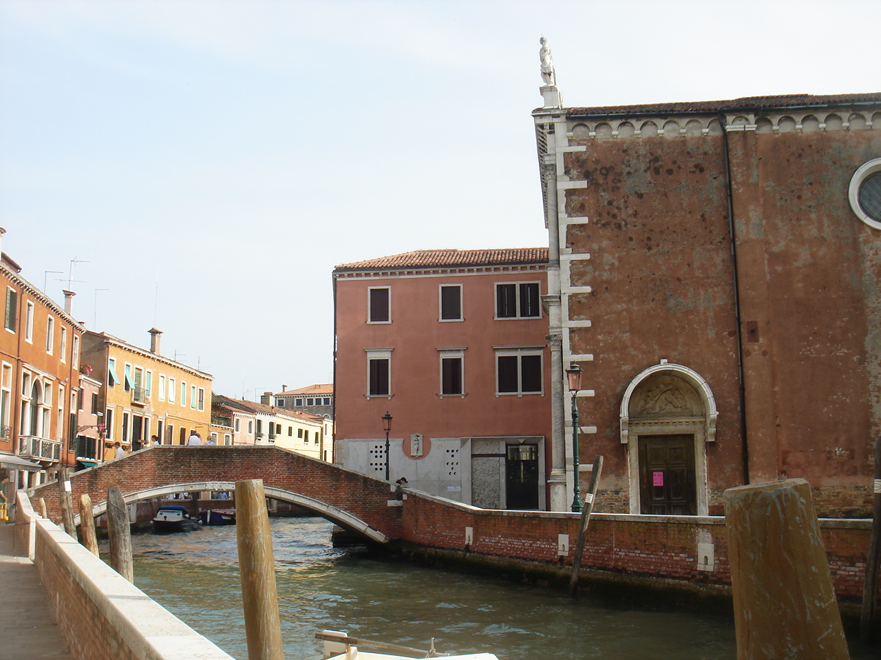 Venezia, ponte e chiesa di San Sebastiano